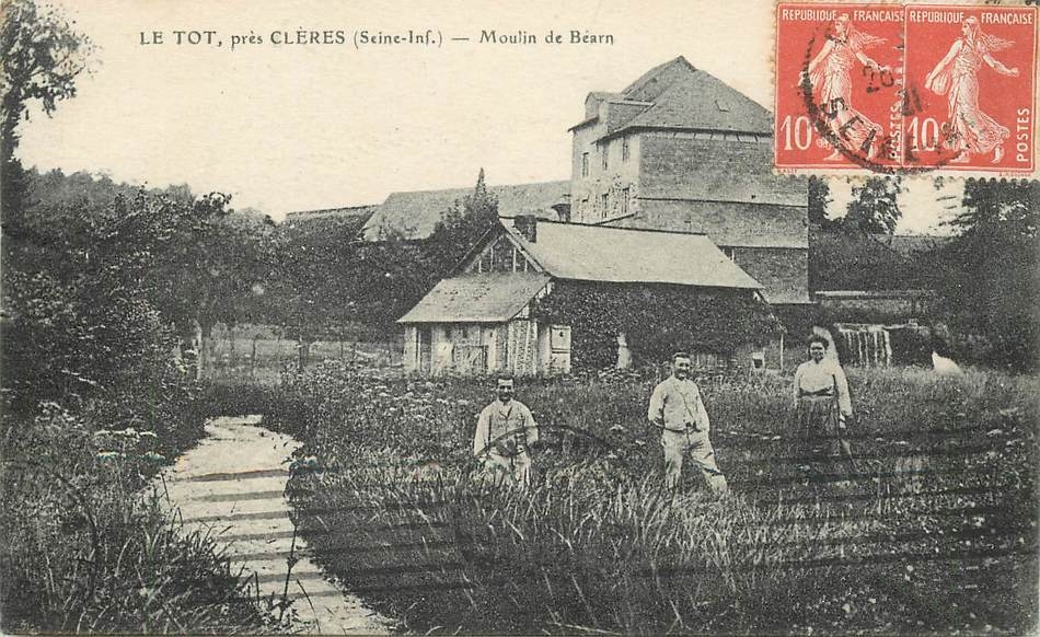 Carte postale du moulin vers 1920.